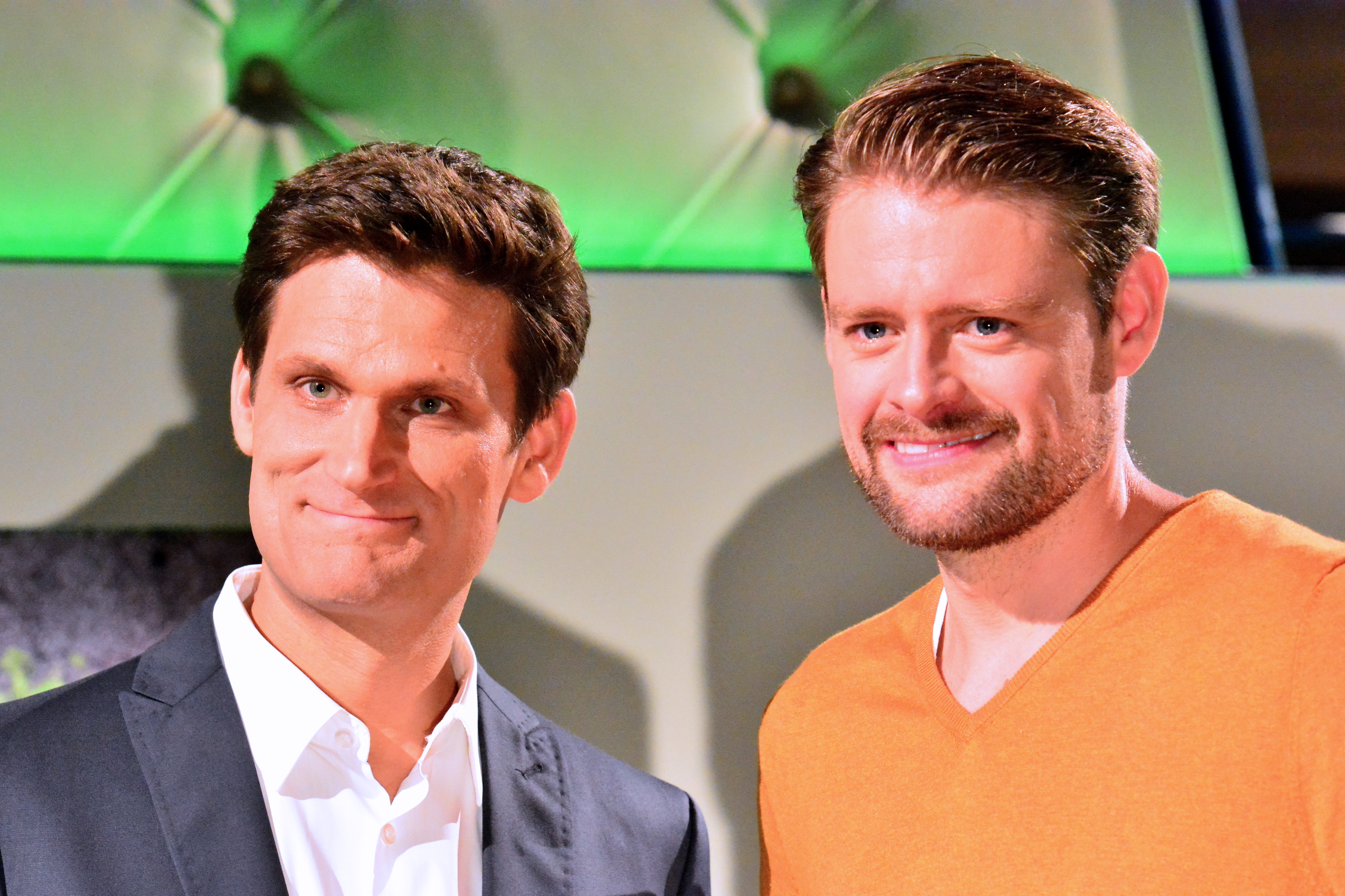 Christian Ehring und 'Max Giermann bei einem Fototermin für die neugestaltete Satireshow extra 3 in den NDR-Fernsehstudios